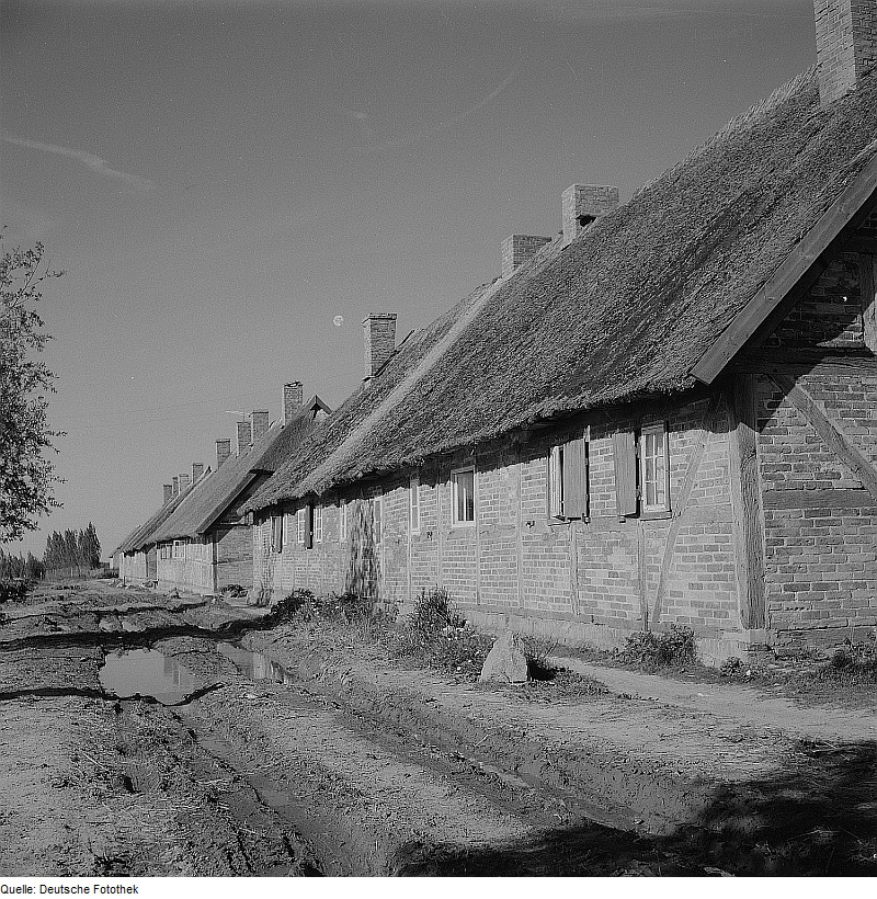 Original image description from the Deutsche FotothekMaltzien. Landarbeiterkaten auf der Halbinsel Zudar